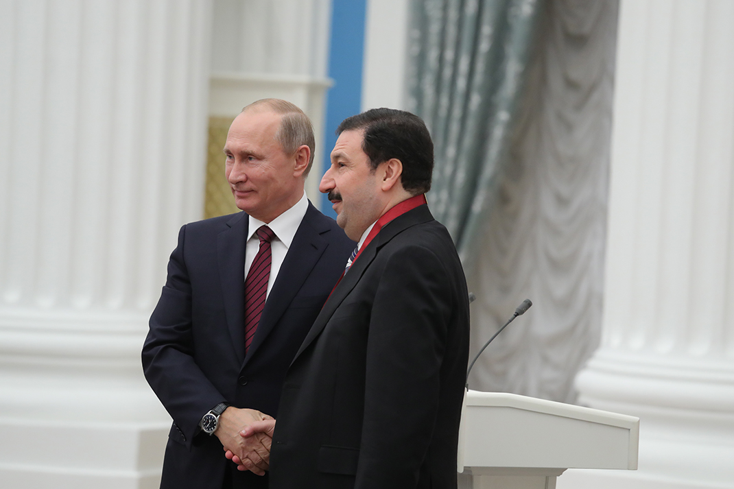 15 ноября 2017 г. Президент России Владимир Путин наградил ректора РАНХиГС Владимира Мау орденом «За заслуги перед Отечеством» III степени